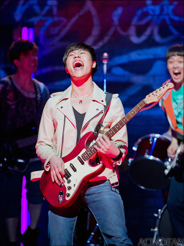 뮤지컬 파리의 연인 프레스콜